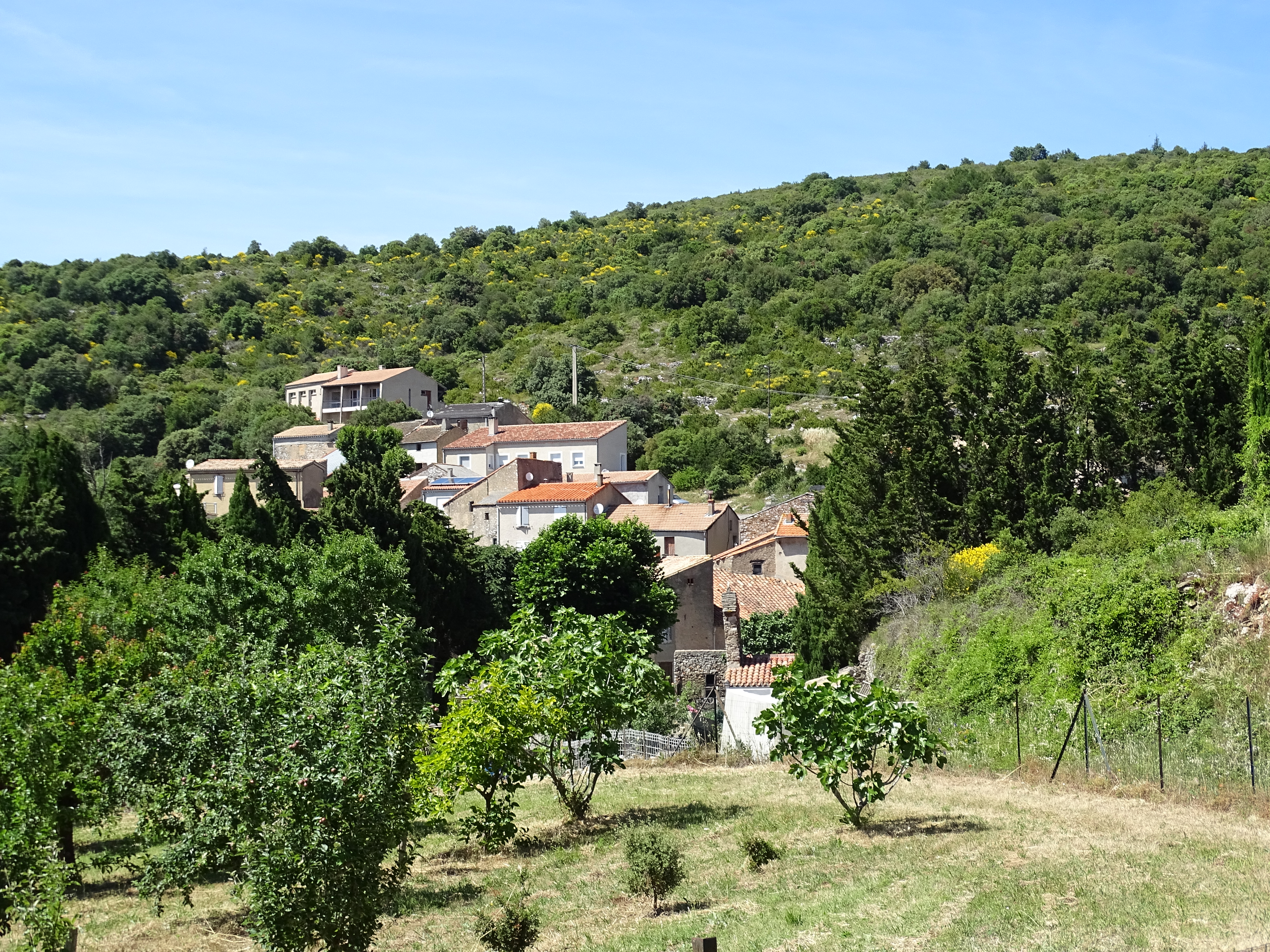 VUE DU VILLAGE